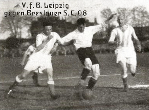 3. Mai 1925 - Im Achtelfinale um die Deutsche Meisterschaft gewinnt der Breslauer SC 08 vor 8.000 Zuschauer in Dresden gegen den mitteldeutschen Meister VfB Leipzig knapp mit 2:1. Bereits in der 5. Spielminute geht der Gast durch ein Tor ihres Außenstürmers Palluschinski mit 1:0 in Führung. Zwar erzielt Halbstürmer Nieher in der 60. Minute den Ausgleich, doch kurz vor Schluss sorgt Halbstürmer Blaschke für das entscheidende Tor zum 2:1. Foto: Blaschke schießt für die südostdeutschen das entscheidende Tor. Links Schmöller, rechts Edy, beide VfB Leipzig.